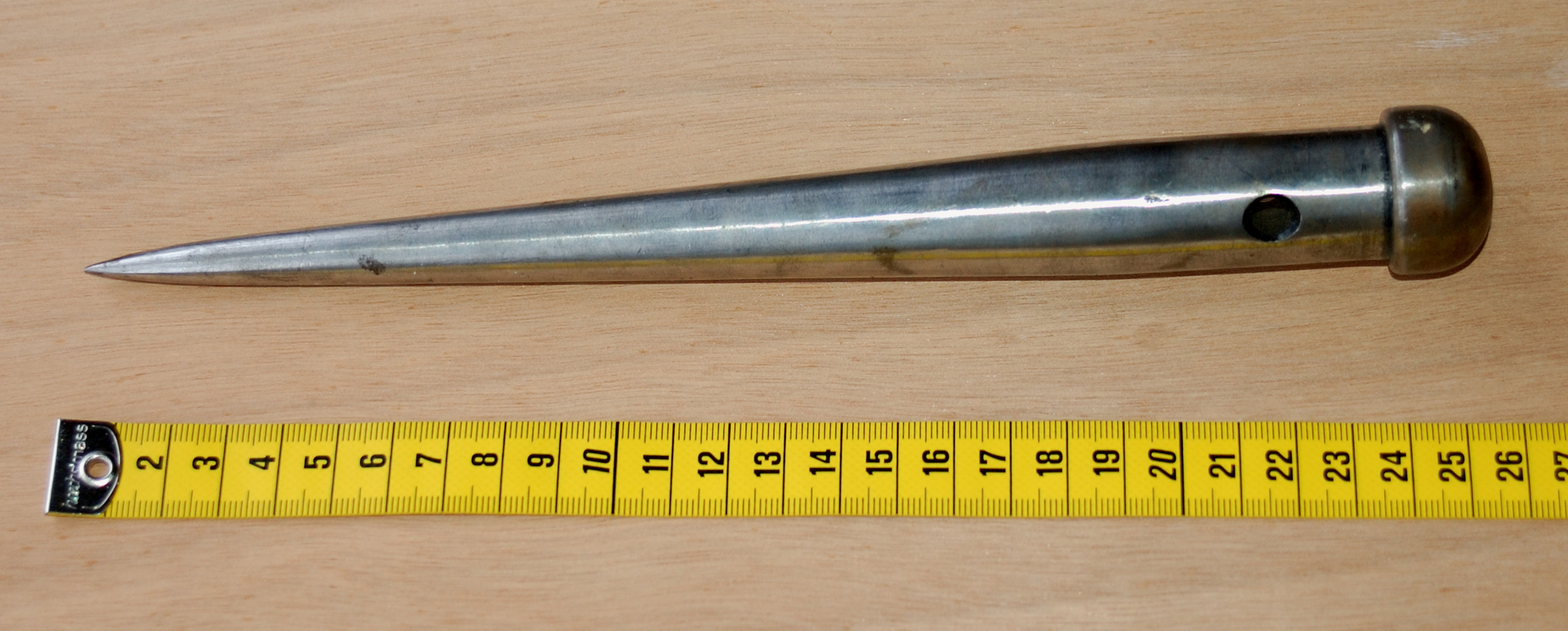 Marlspieker